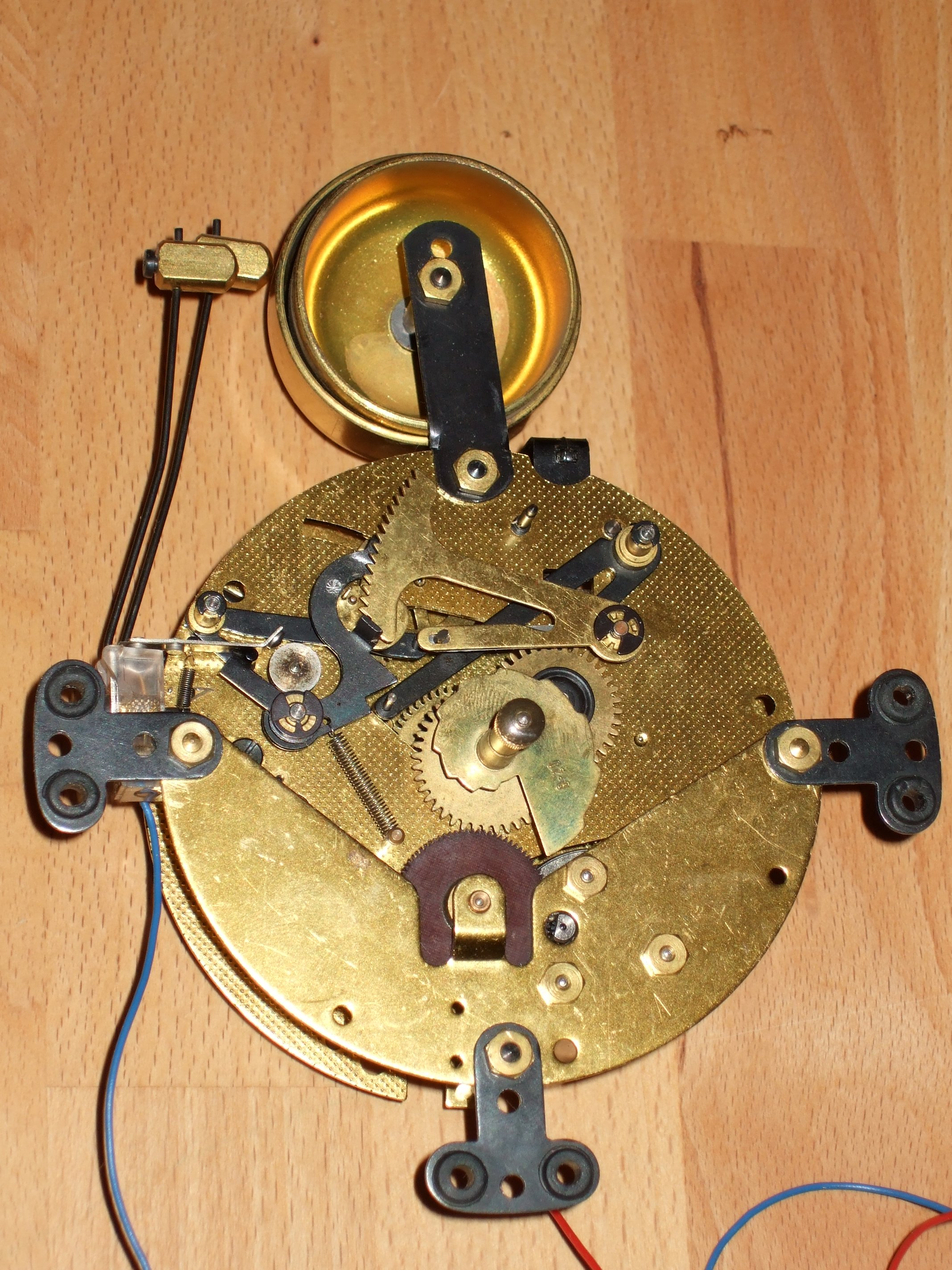 Batterieuhrwerk von Firma Hermle mit motorischem Aufzug und Schlagwerk